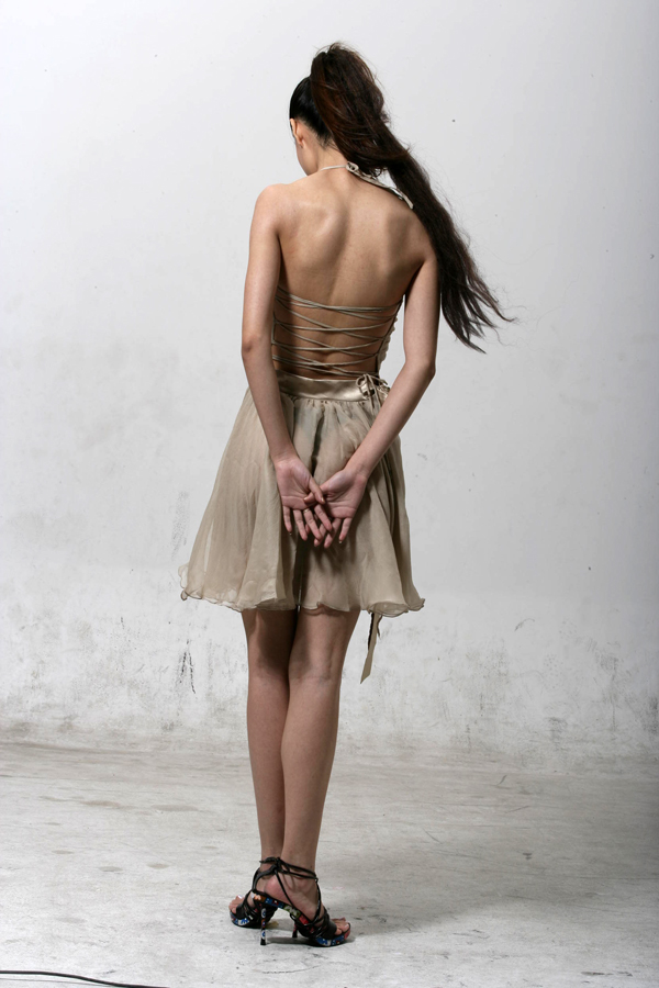 Model, from behind.